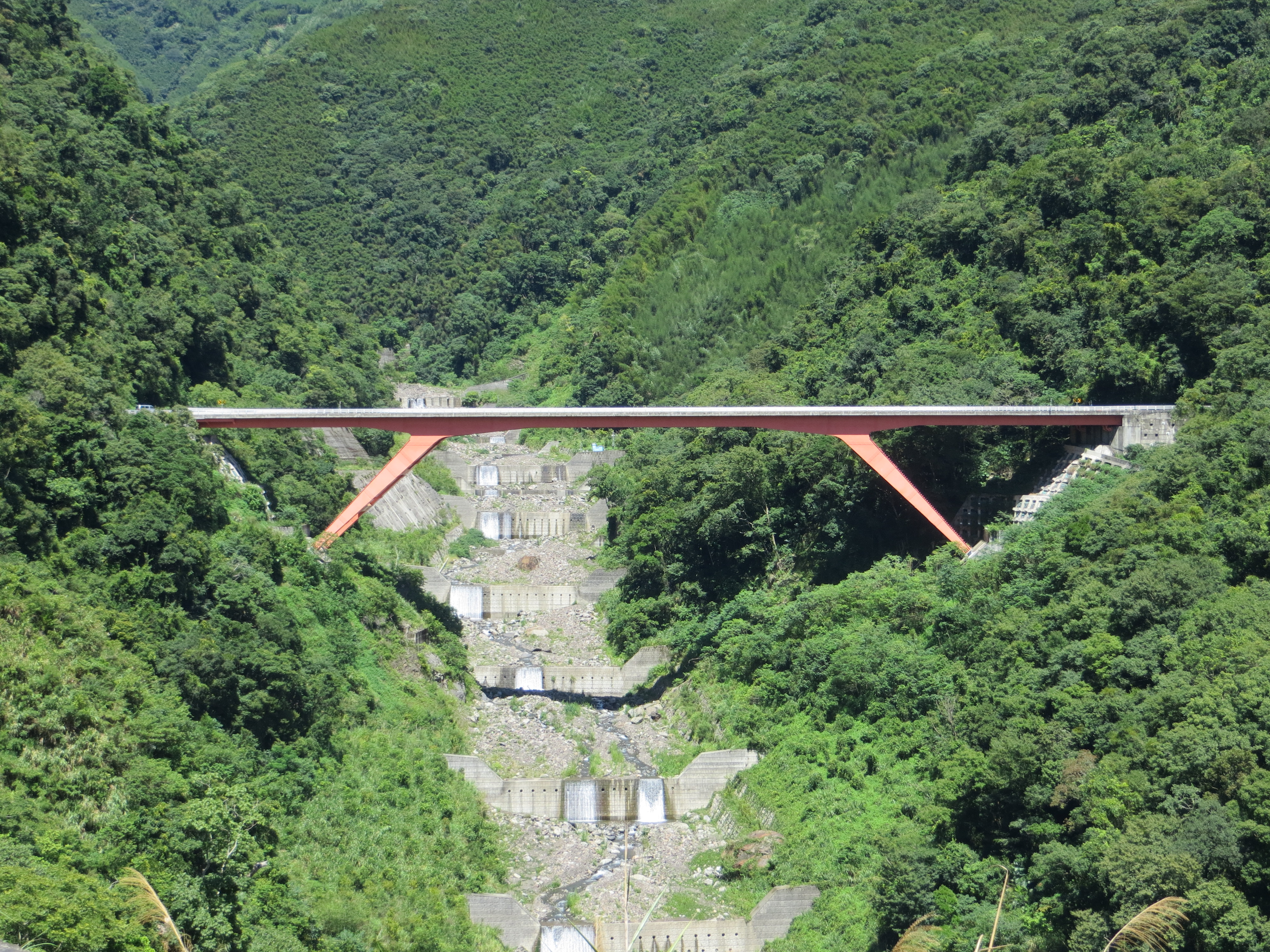 原本蘇樂橋為一跨蘇樂溪小橋，配合整治工程和遠離土石流，而改以一橘色π型鋼樑橋截彎取直跨越蘇樂溪，2010年通車。